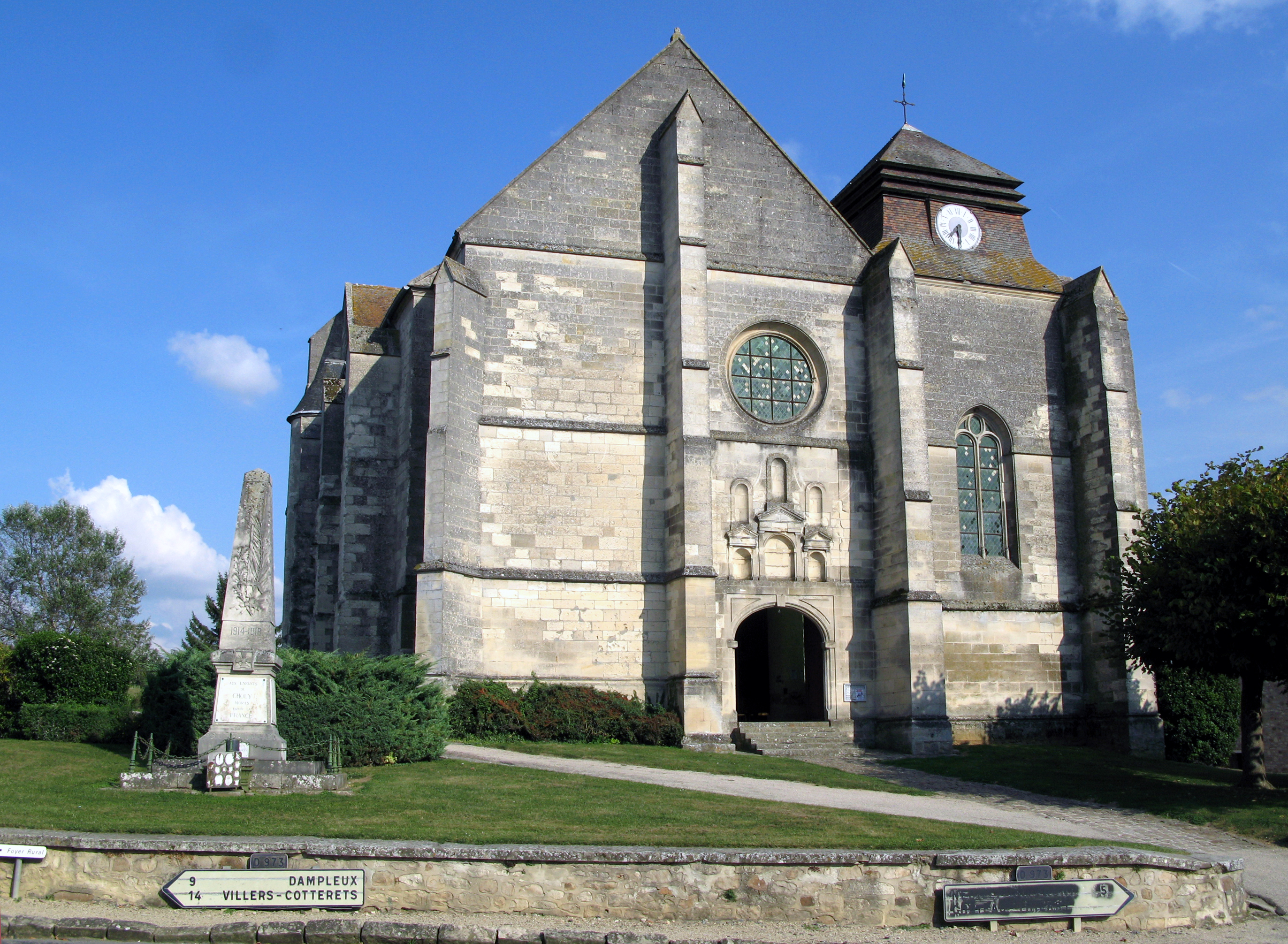 Chouy (Aisne, France) - L'église et le monument-aux-morts. La façade de l'église est ornée de 6 niches (aujourd'hui dépourvues de statues) entre le portail et la rosace. .